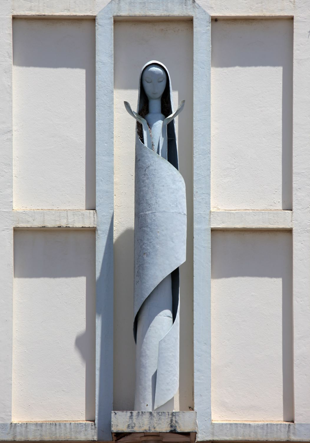 Statue de l'Eglise de La Trinite (Saint-Denis) par Guy Lefèvre